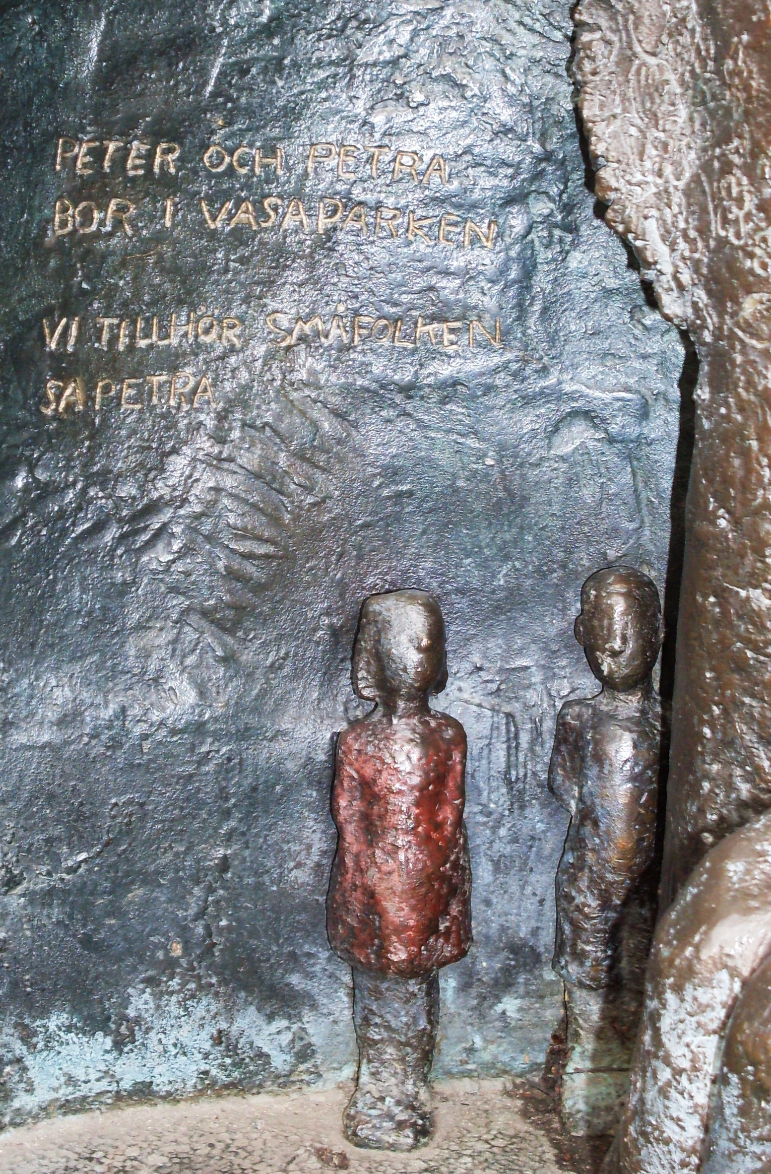 Vid sidan av Astrid Lindgren på Majalisa Alexandersons skulptur i Tegnérlunden ses Peter och Petra ur ”Nils Karlsson-Pyssling”.